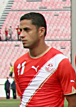 Mehdi Meriah, joueur de football tunisien